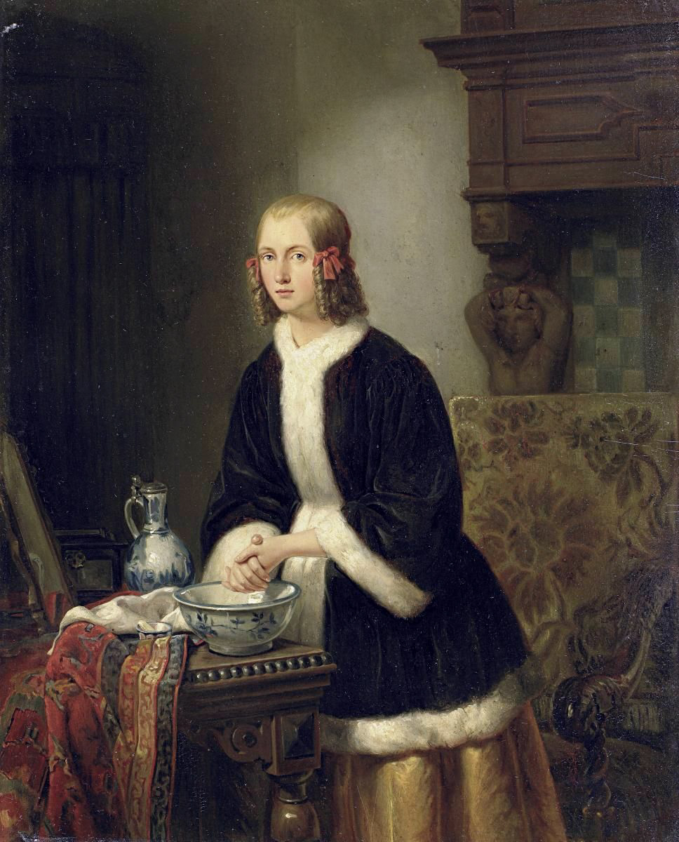 Vornehme junge Dame bei der Morgentoilette. Öl auf Holz. 36 x 29 cm